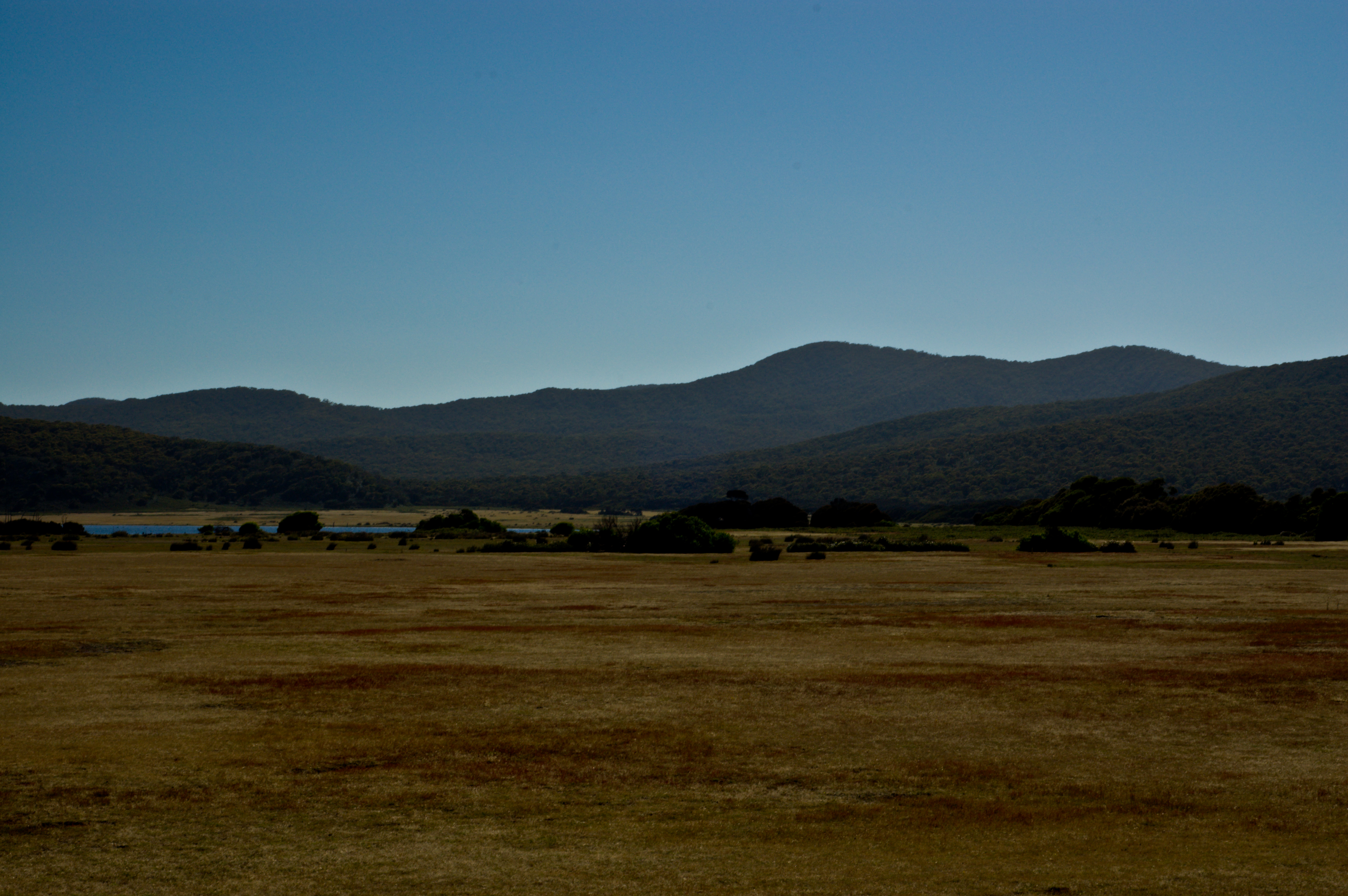 Narawntapu National Park